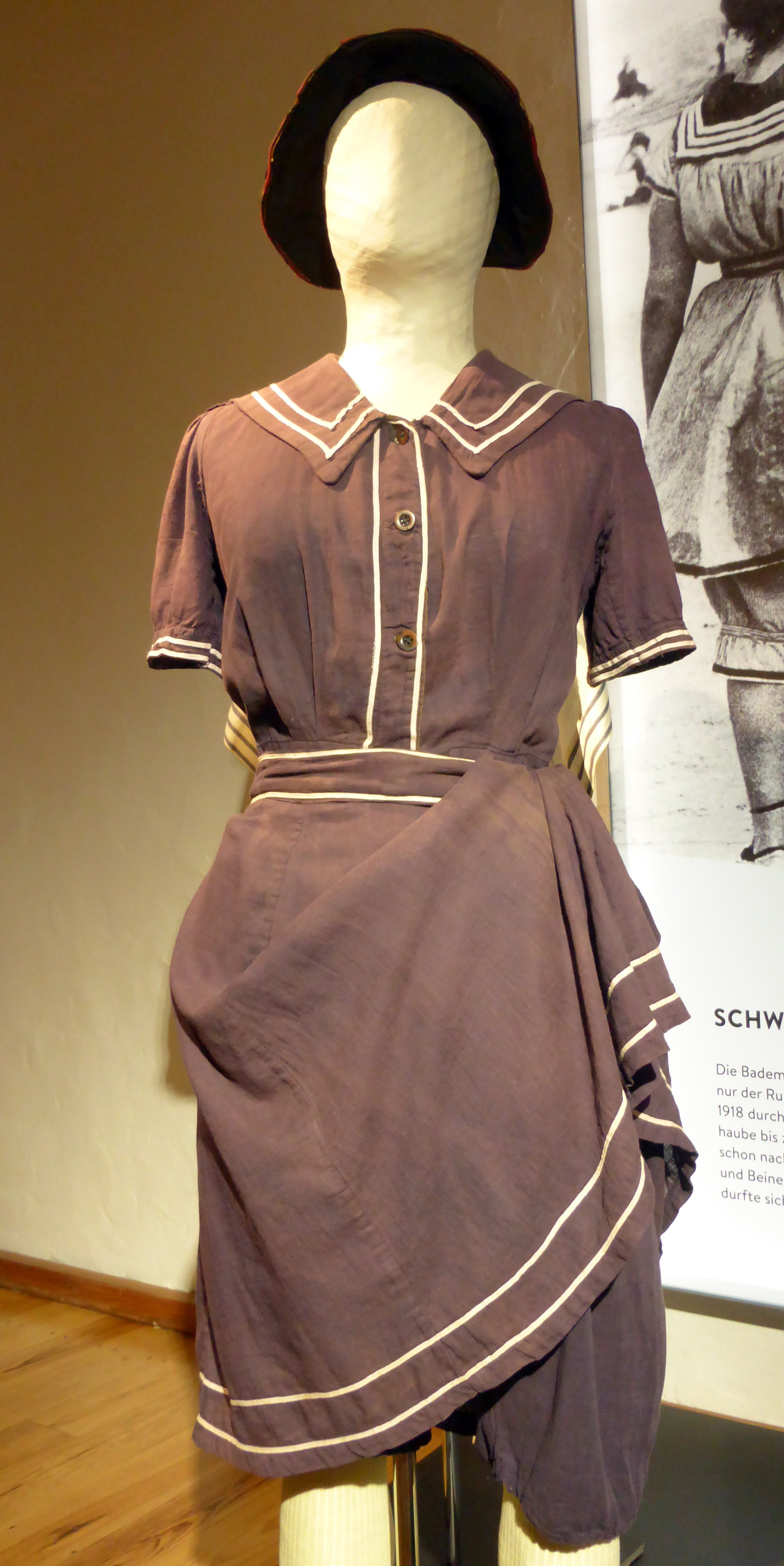 Sonderausstellung: Macht der Mode. Badeanzug um 1900 im Textilmuseum Cromford in Ratingen.